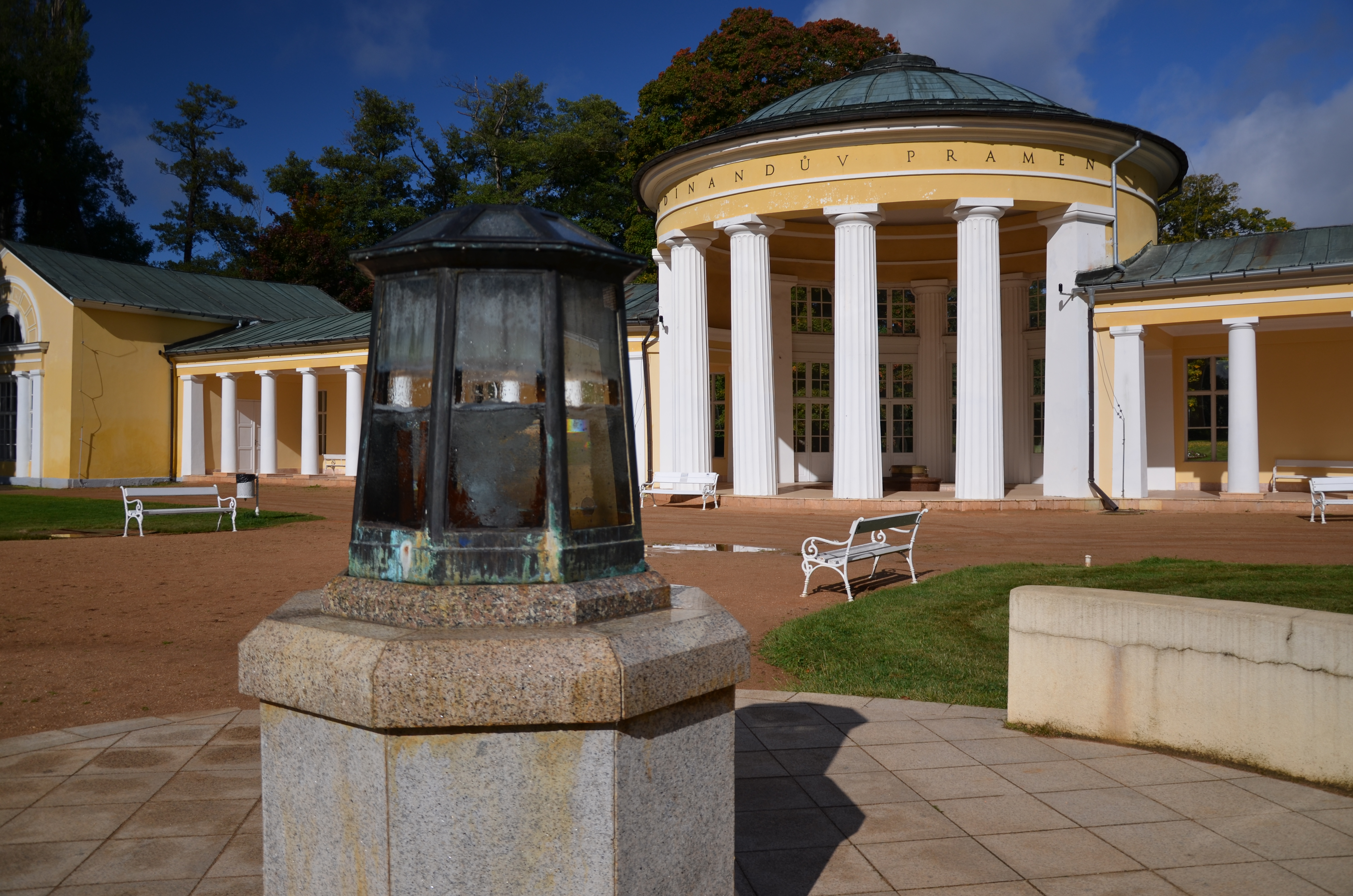 Kolonáda Ferdinandova pramene (Úšovice)